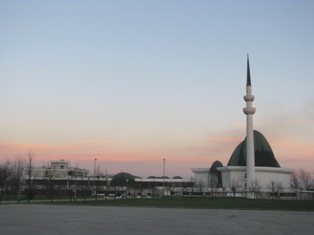 Islamski centar u Zagrebu